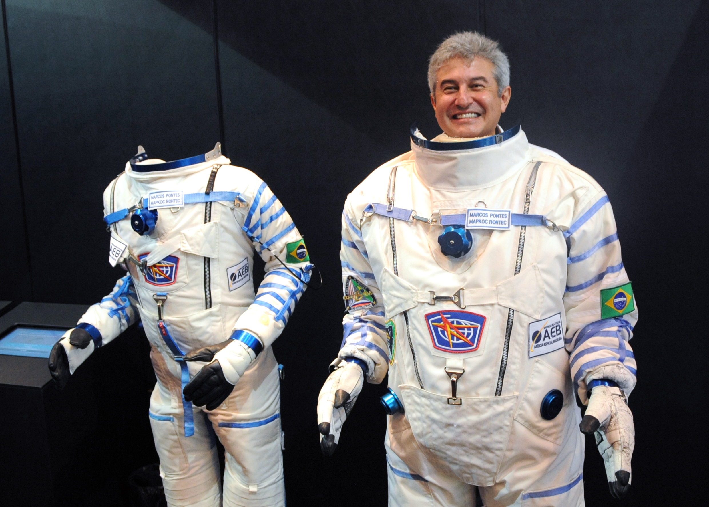 O astronauta brasileiro Marcos Pontes na abertura da Semana Nacional de Ciência e Tecnologia, que reuniu na Esplanada dos Ministérios feiras de ciência, palestras, oficinas, distribuição de cartilhas, encartes e livros, além de exibição de filmes. O tema desta edição foi Ciência no Brasil, em comemoração às descobertas e invenções no país.